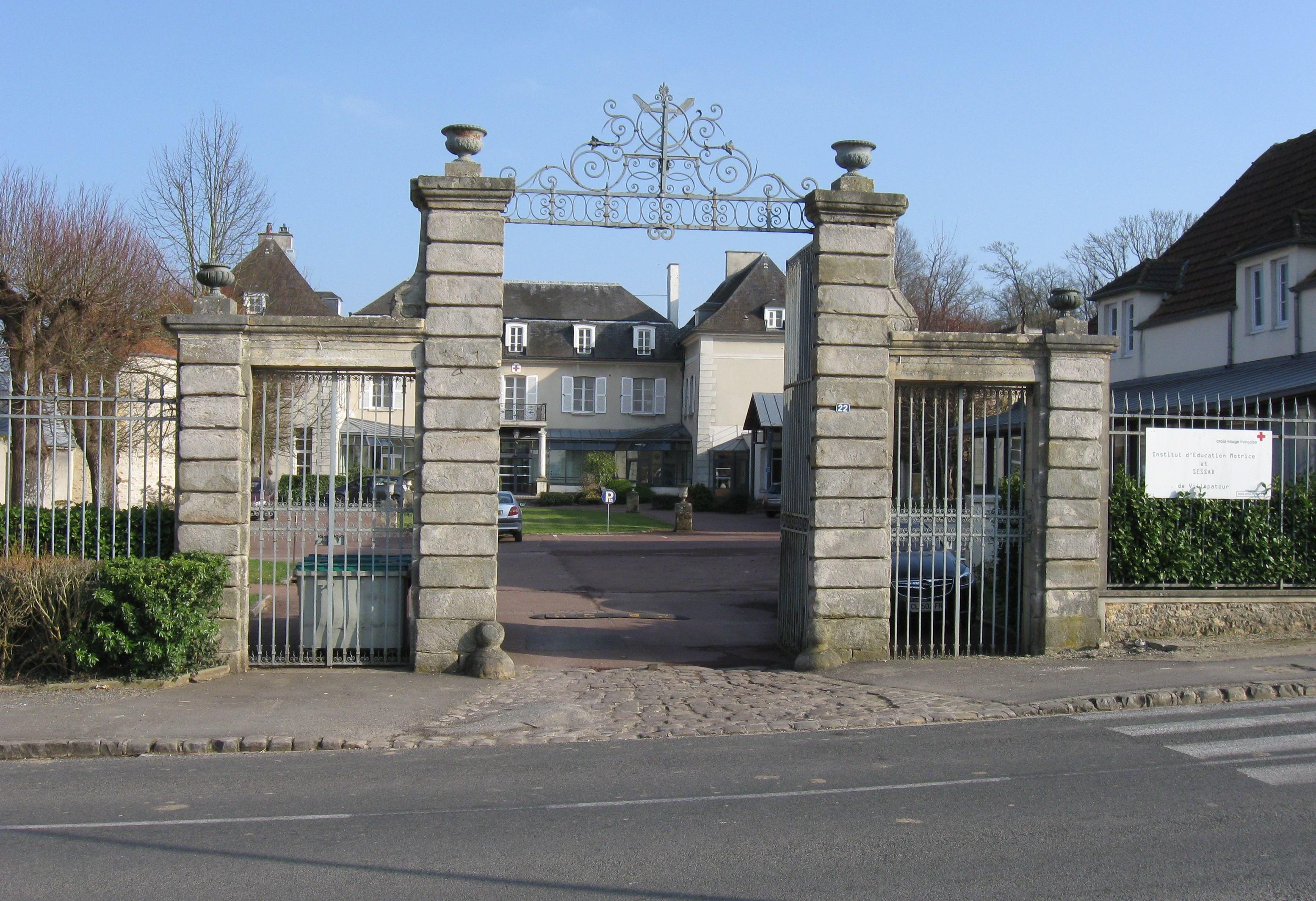 Château de Villepatour à Presles-en-Brie. (Seine-et-Marne, région Île-de-France).